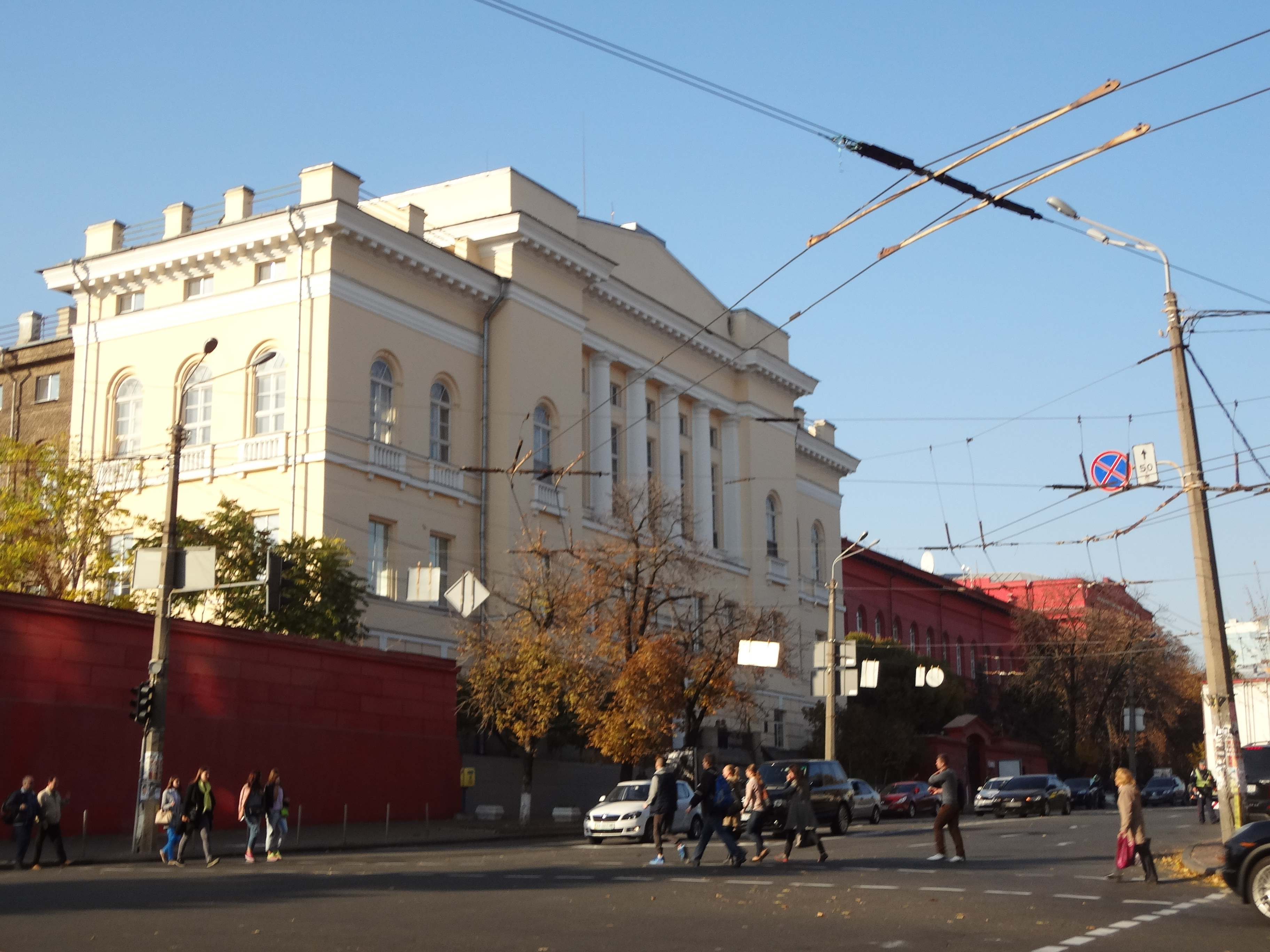 Національна бібліотека України (1918 р.), діяльність якої пов'язана з іменами наукових та державних діячів: М. П. Василенка, В. І. Вернадського, А. Ю. Кримського, С. О. Єфремова, Д. І. Багалія, В. І. Липського, Д. О. Граве, Київ, Володимирська вул., 62